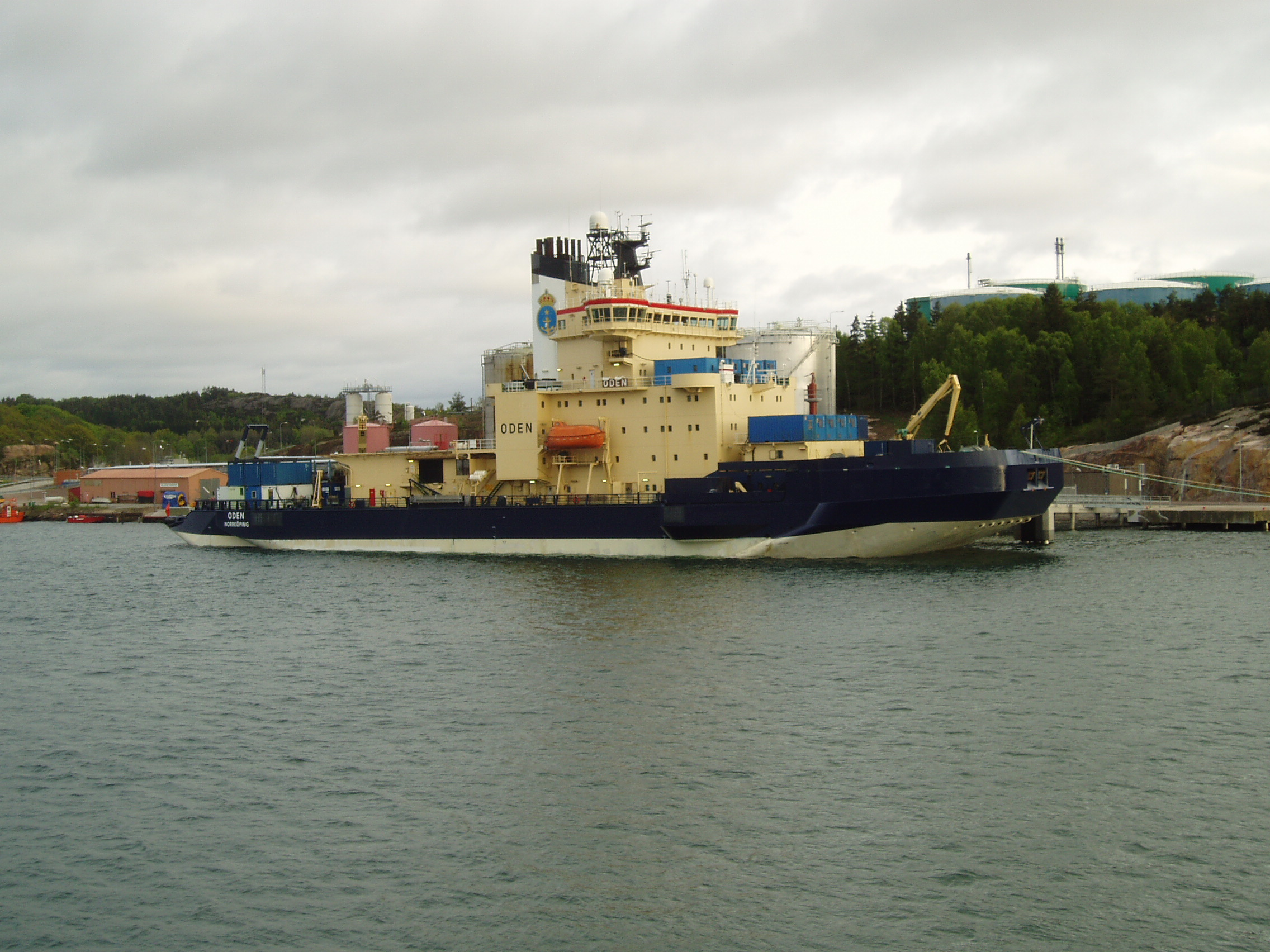 Icebreaker Oden, SMLQ, IMO: 8700876, bunkering in Brofjorden, Sweden 2007